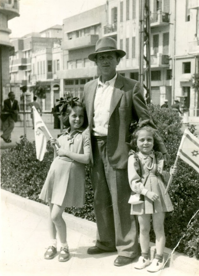 יום העצמאות 1949 בתל-אביב